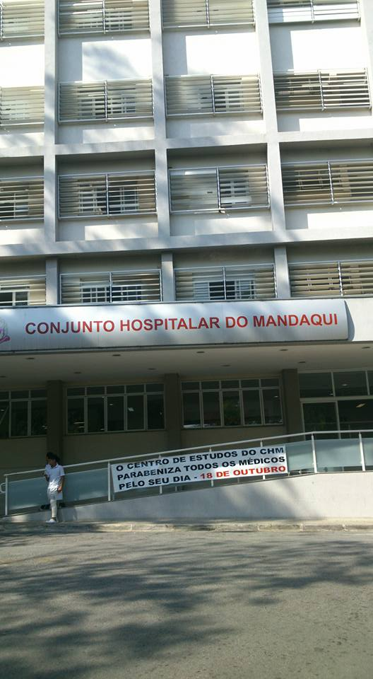 Conjunto Hospitalar do Mandaqui, complexo hospitalar público do estado de São Paulo. Brasil